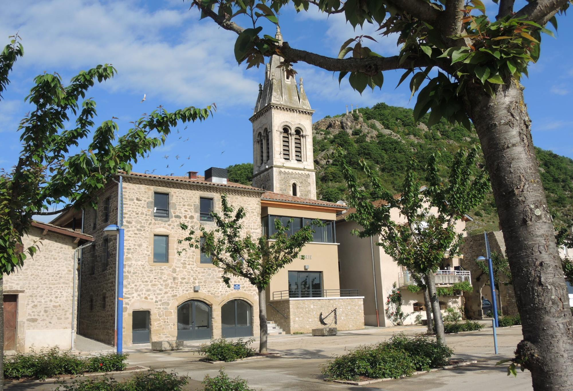 Andance vue générale et détails